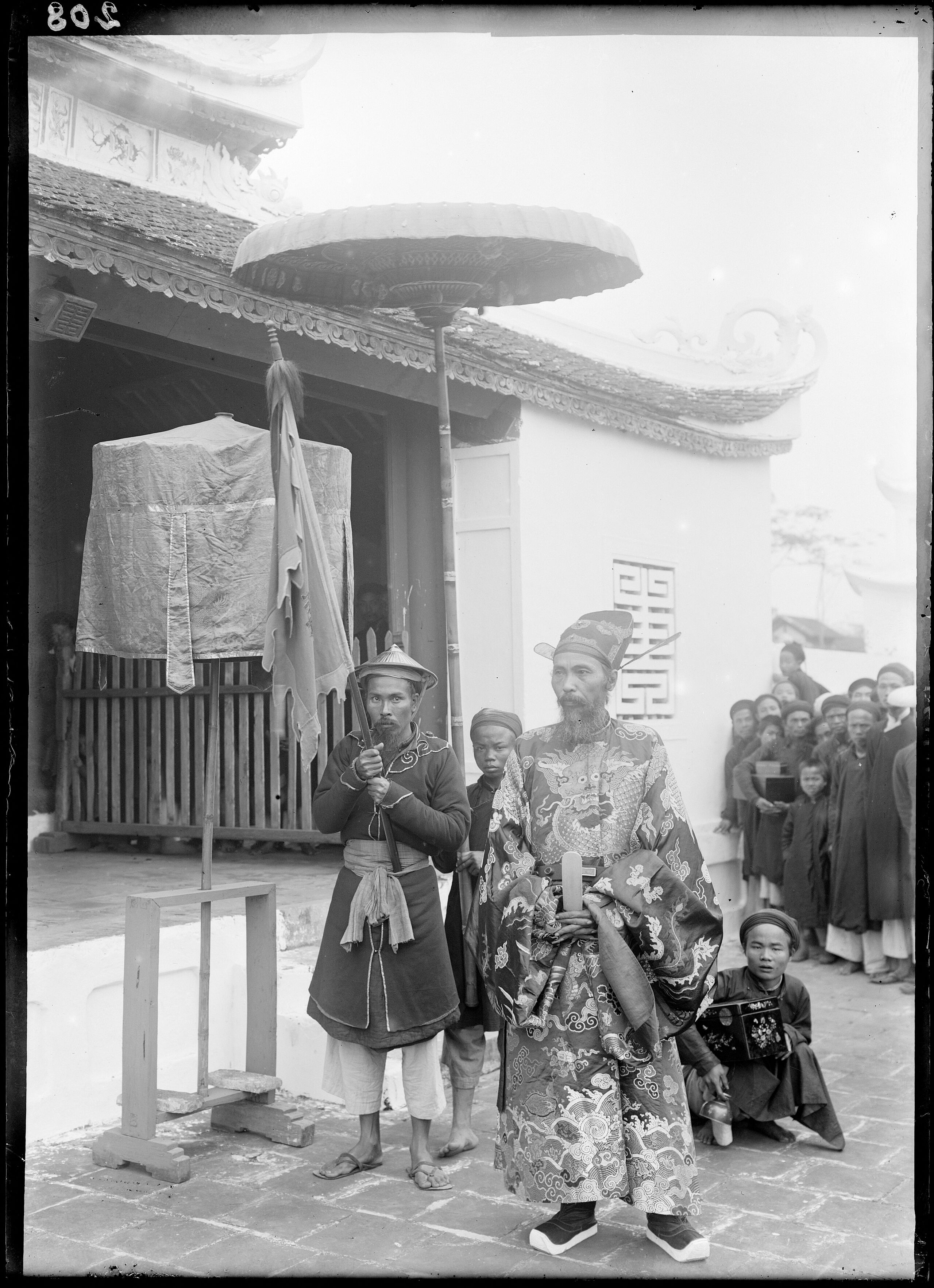 Tonkin. Nam-Dinh. S.E. Cao-Xuan-Duc, tong-doc de la province venant de participer aux salutations à la pagode royale, des lauréats du concours triennal. / [photogr.] A. S[alles]